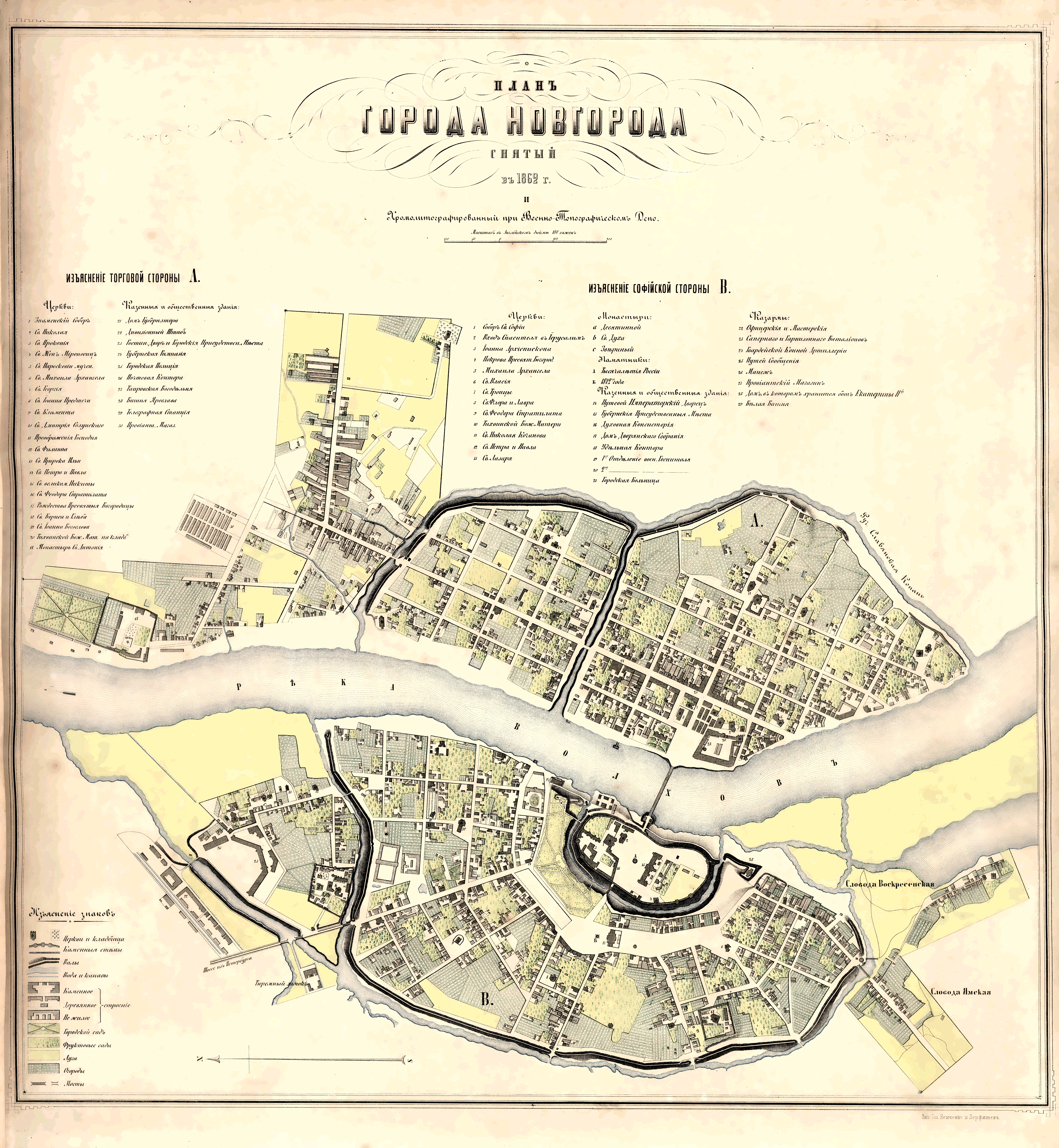 План Новгорода, снятый в1862 году и хромолитографированный в Военно-Топографическом Депо.